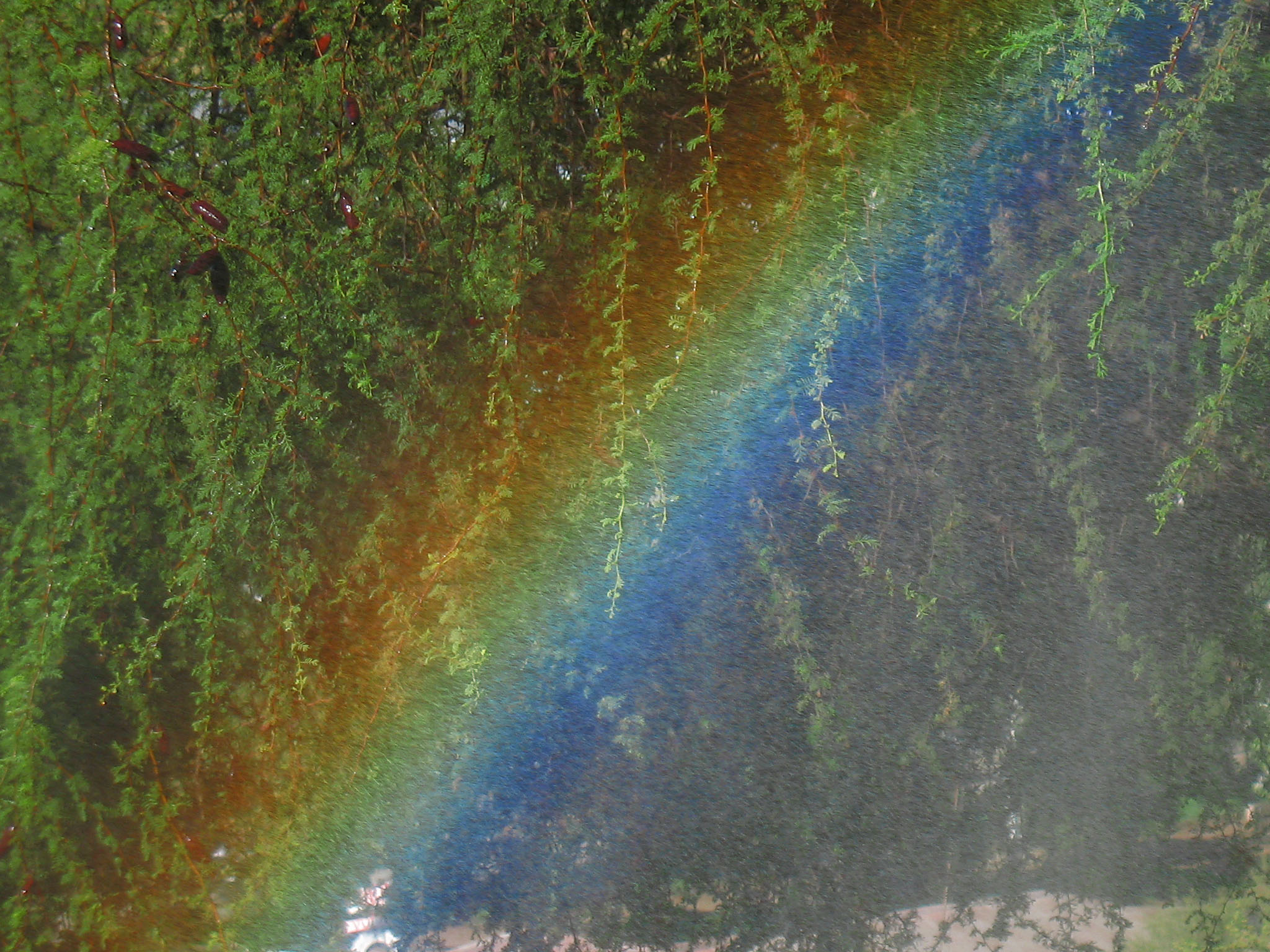 Mini arcoiris